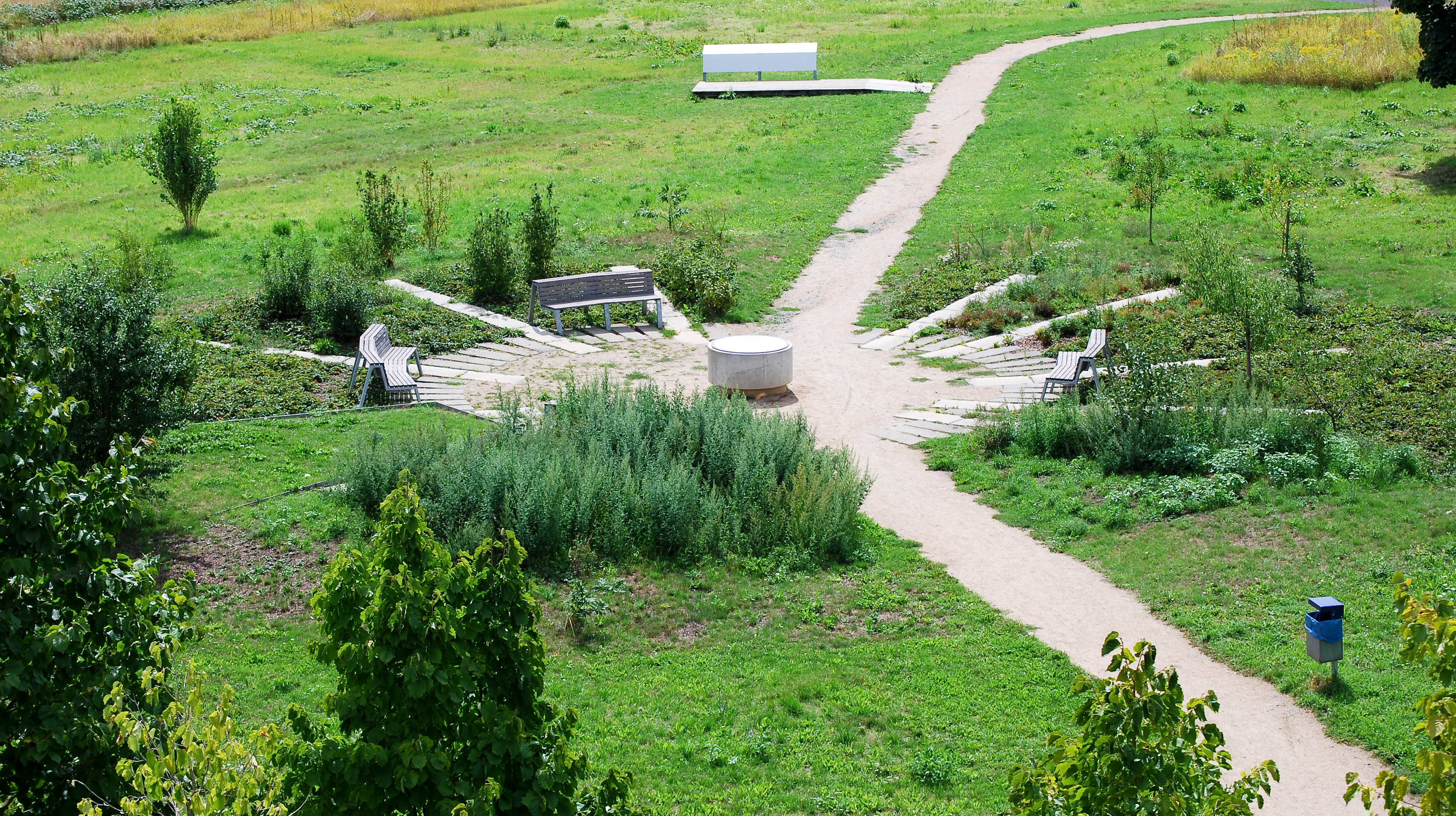 Wetterpark Offenbach - Station Phänologie